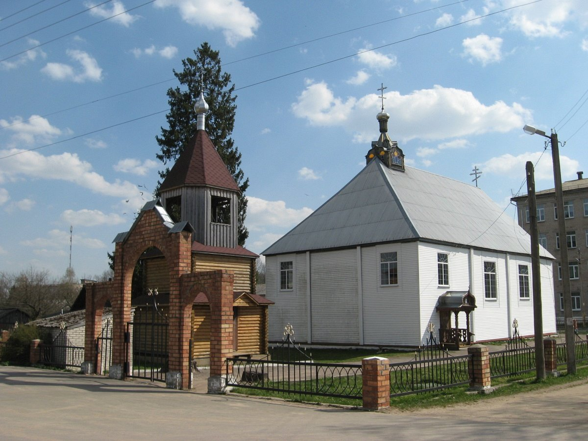 Ілья. Свята-Ільінская царква